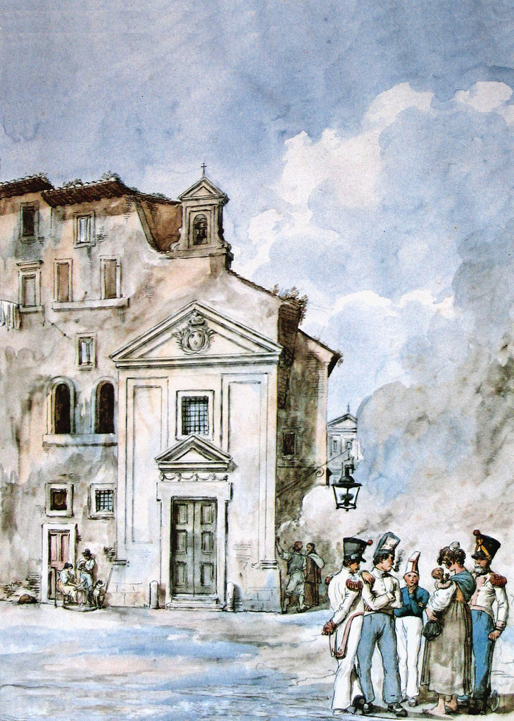 Chiesa distrutta di Santa Maria della Purificazione in Banchi